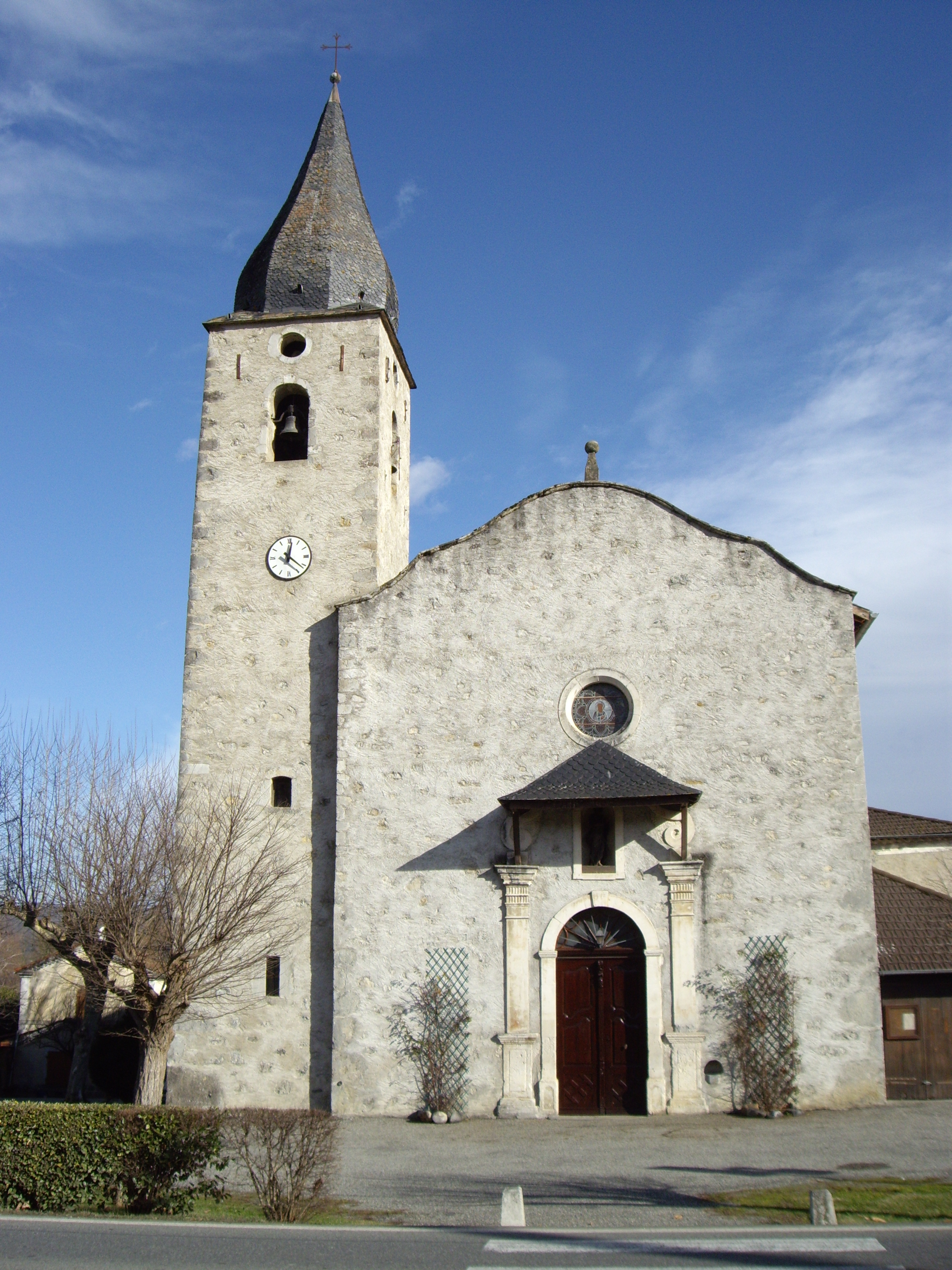 Église Saint-Barthélémy de Caumont (Ariège, France).